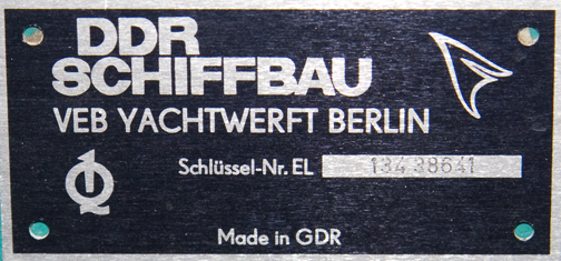 Typenschild Yoxy.